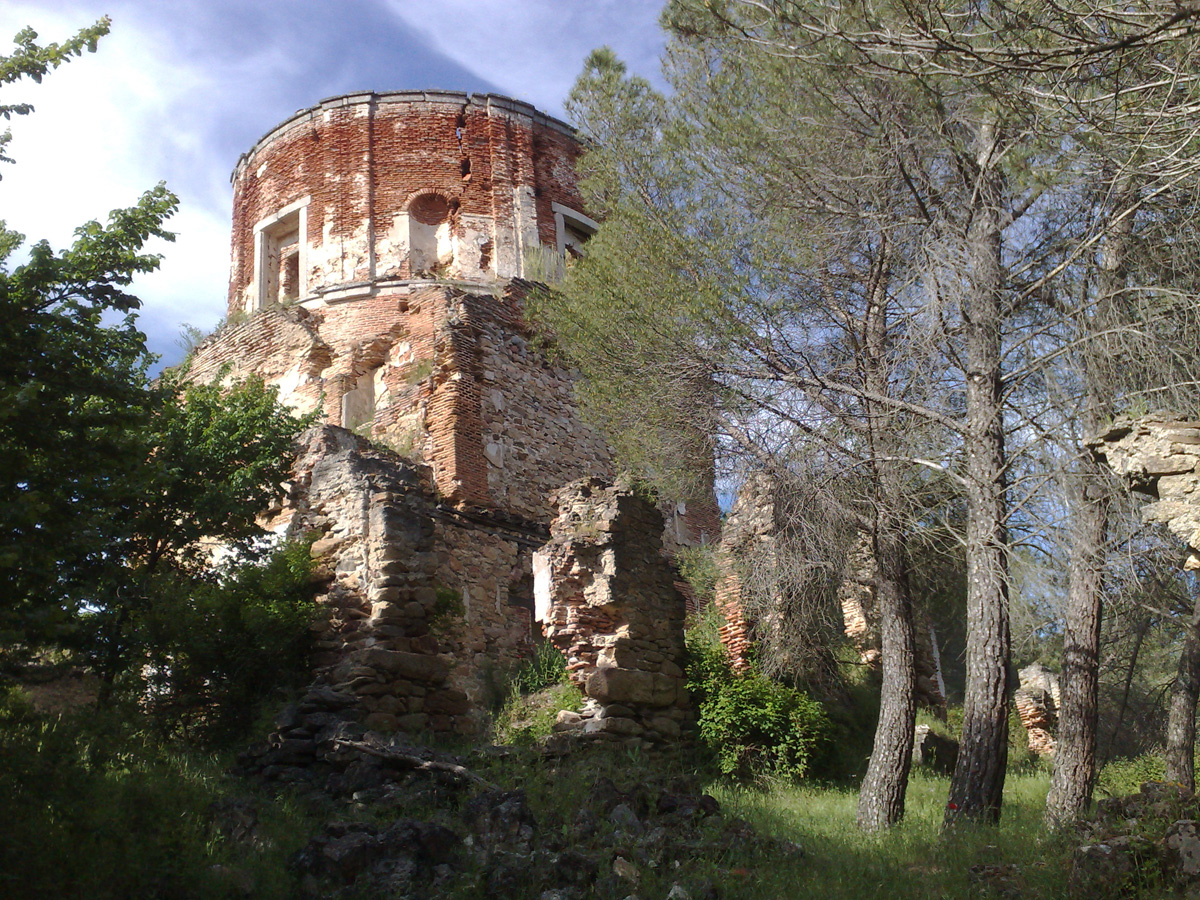 Se trata de una interesante casa de campo para recreo de los Duques del Infantado. Fue construida a principios del siglo XVII basada en los modelos para las villas italianas de Palladio, y en cierta forma está relacionada con la Villa Rotonda. No obstante, el interés que ofrece su arquitectura se halla actualmente en estado ruinoso. Se encuentra a unos 2 km de Buitrago, en la finca de "El Bosque".